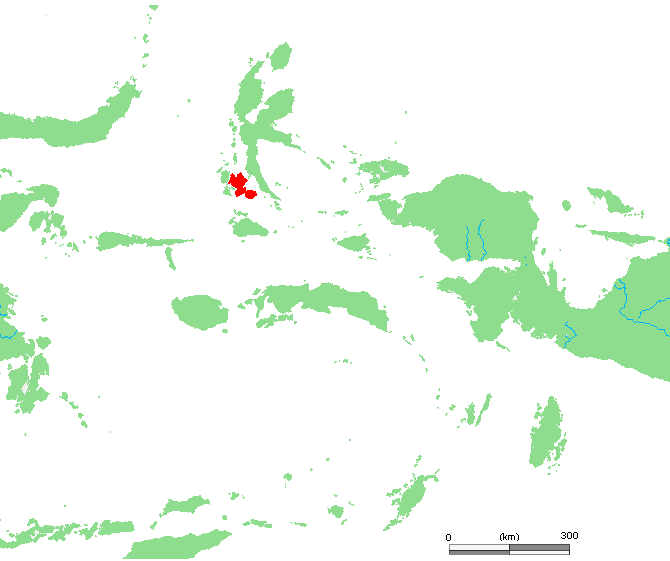 ID Bacan.PNG